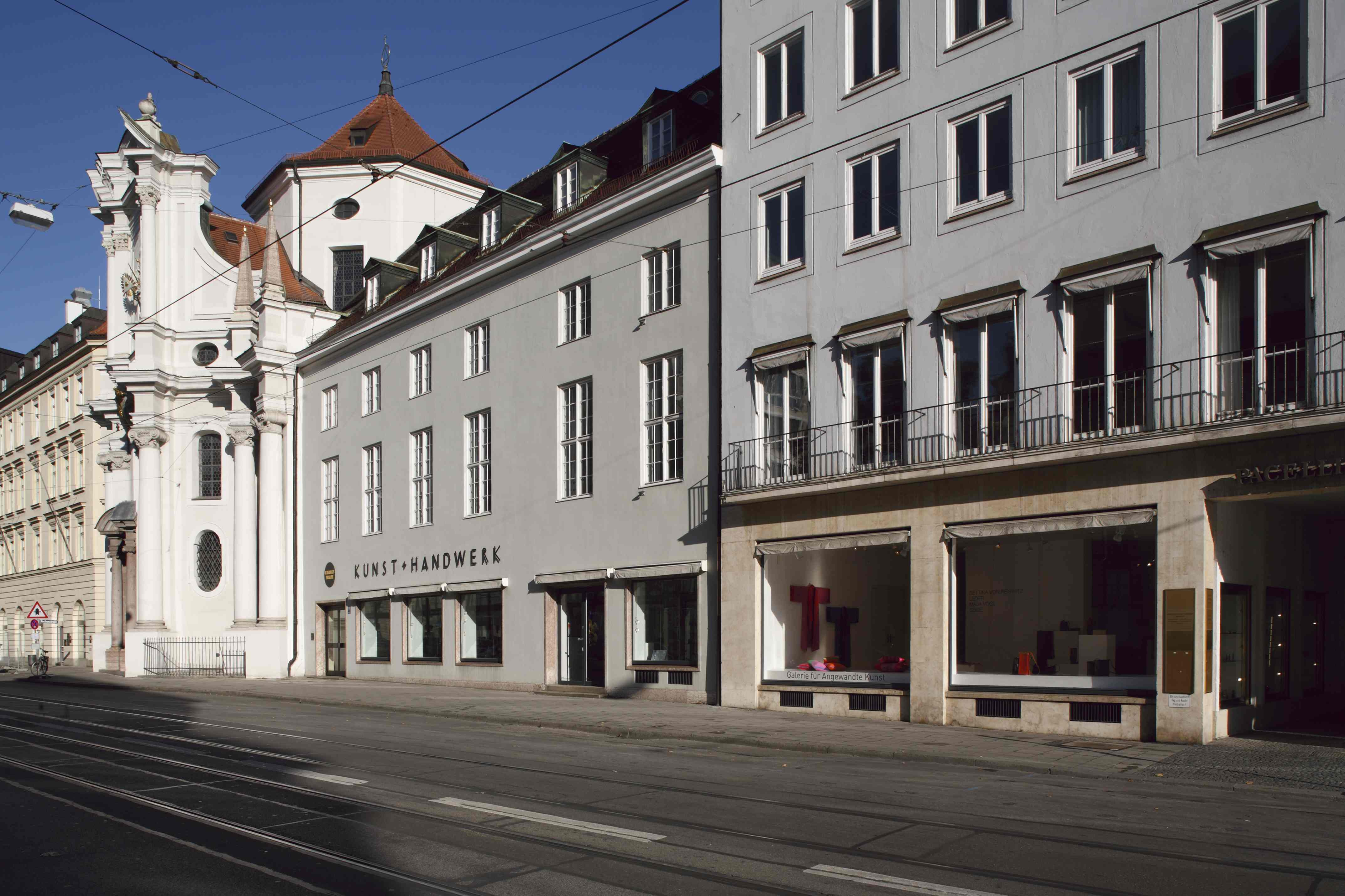 Bayerischer Kunstgewerbeverein, Vereinshaus